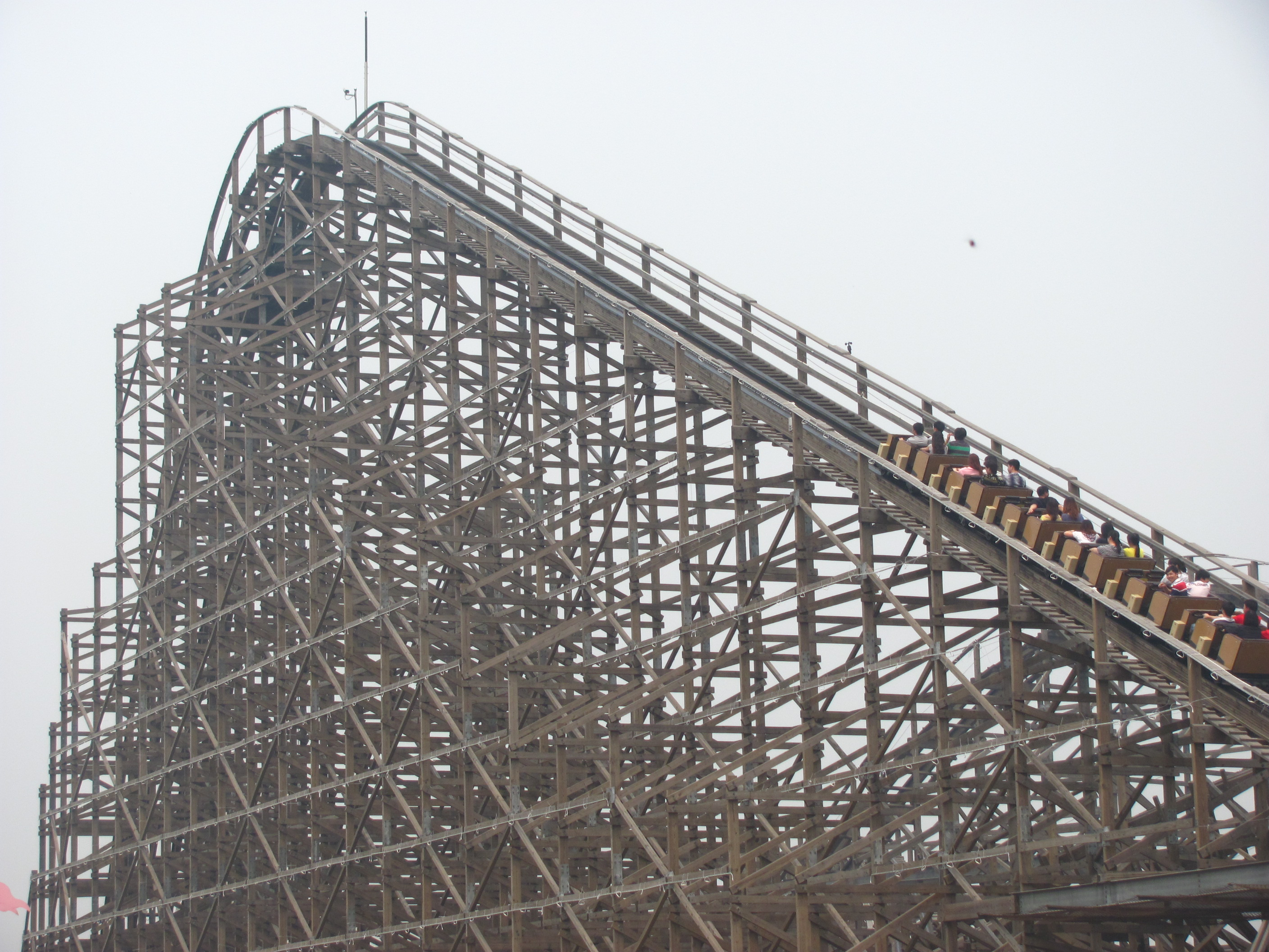 Happy Valley Shanghai